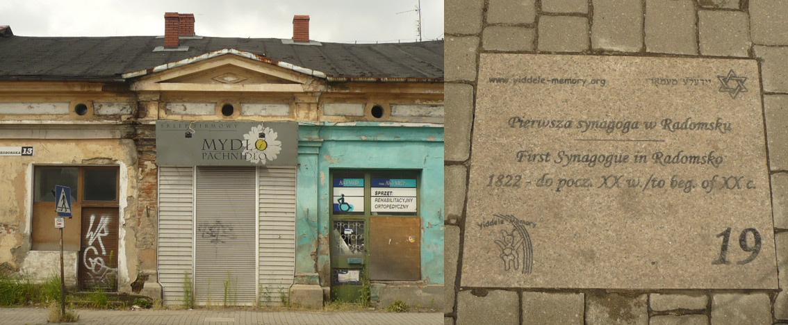 Radomsko. Otwarte Muzeum Żydowskie 19